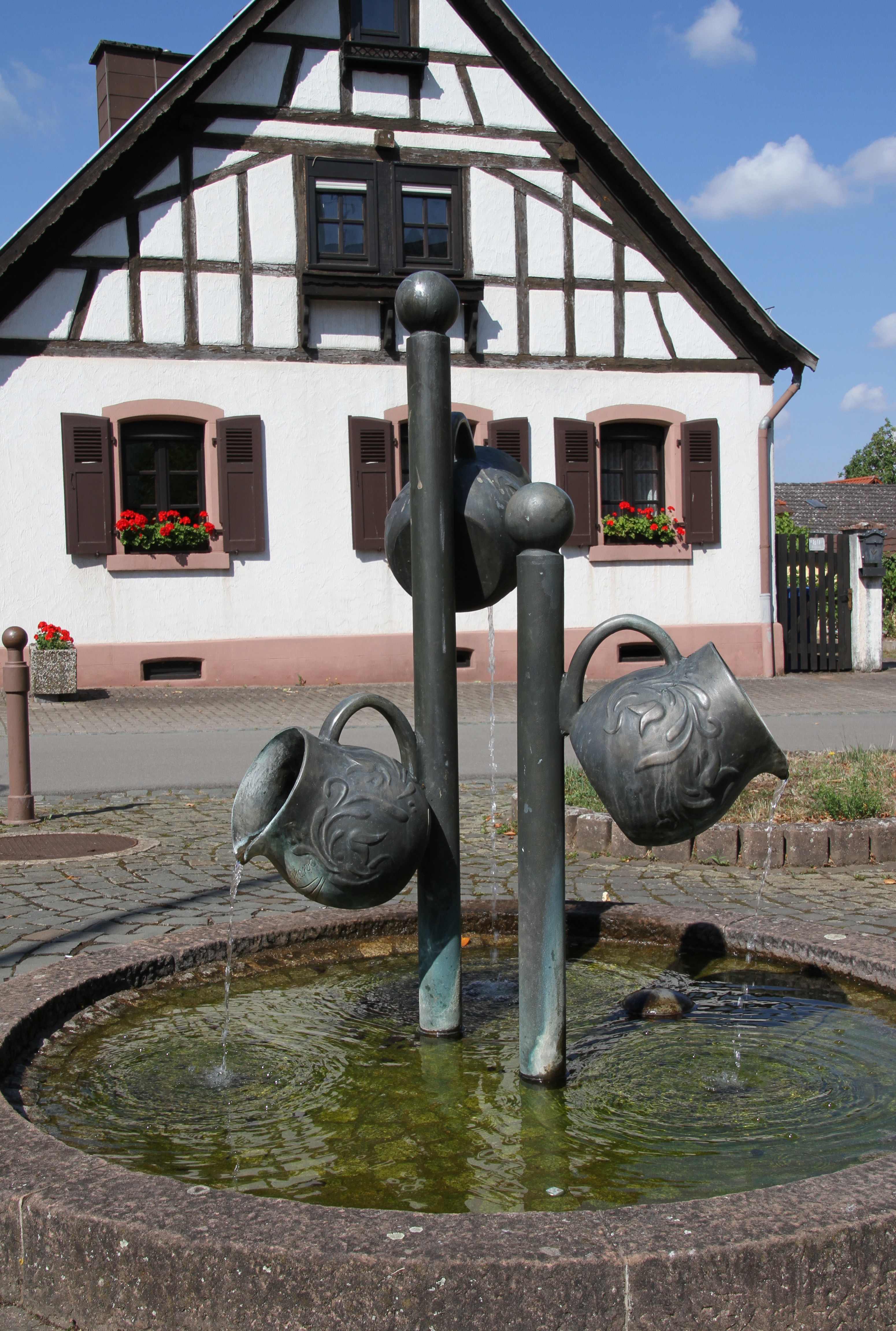 Clausen, Hääwebrunne.